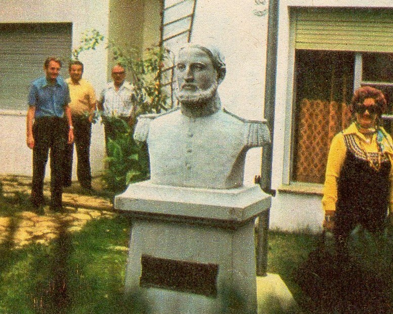 Pomnik gen. Teofila Iwanowskiego w Merlo koło Buenos Aires.